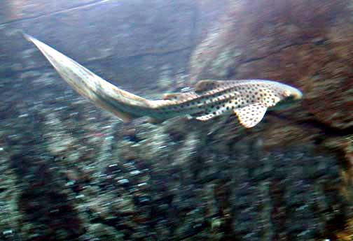 Stegostoma fasciatum